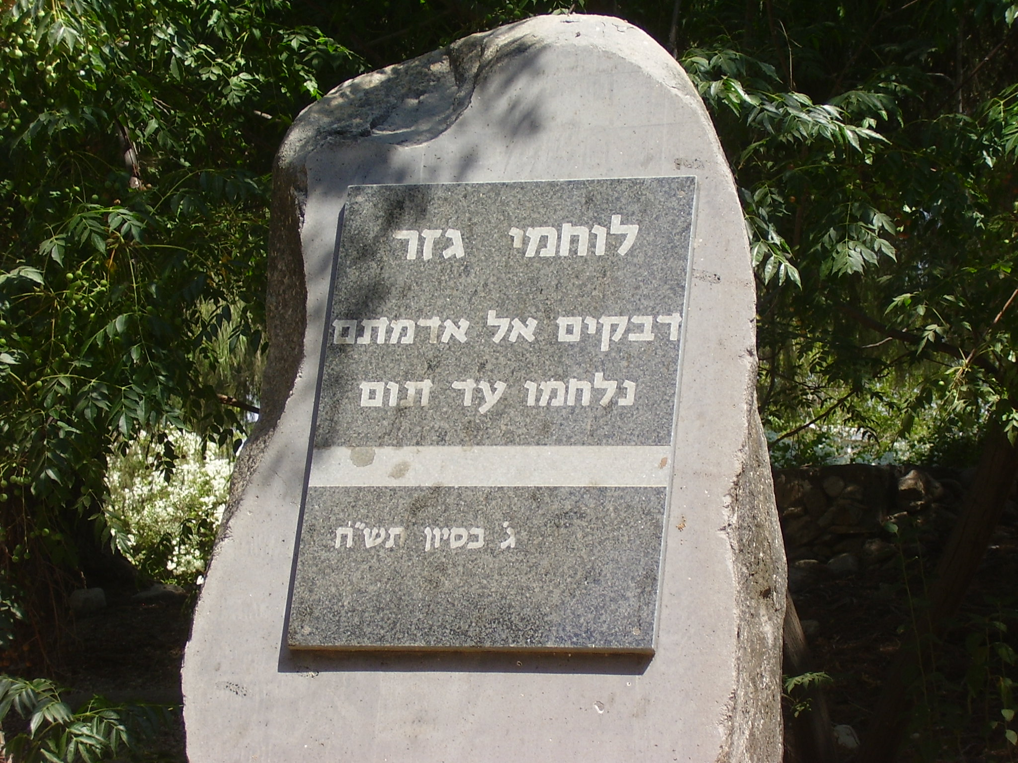 לע הנצחה בבית העלמין בקיבוץ גזר, לחללי קרב גזר במלחמת העצמאות